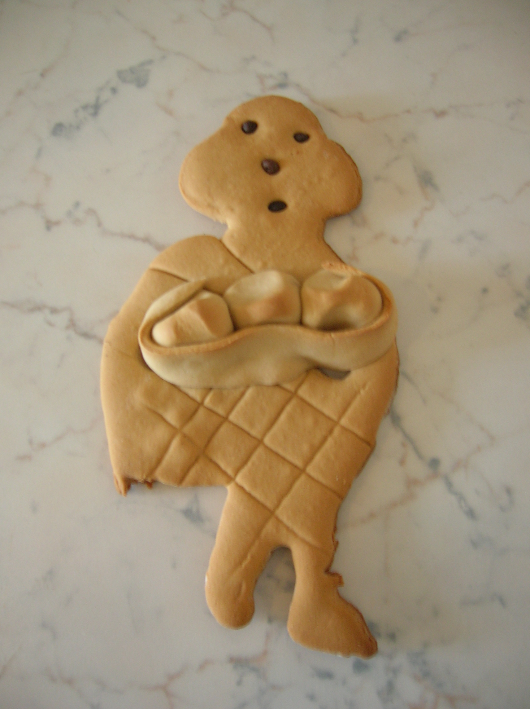 Una versione di pupazza frascatana, biscotto di Frascati, Lazio, Italia.